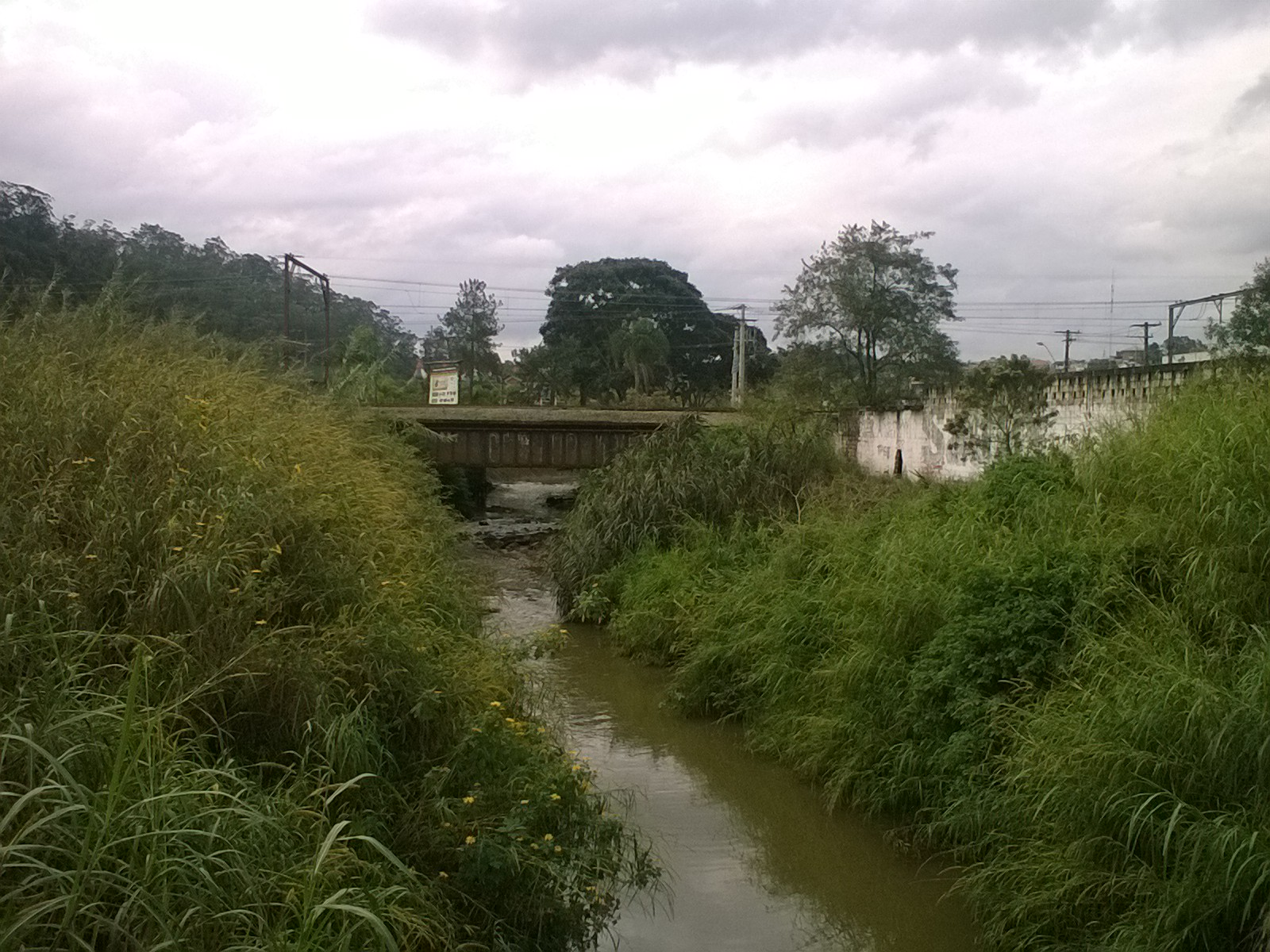 A foto retrata o Ribeirão Grande, principal aquífero da cidade, que corre sob a ponte da São Paulo Railway